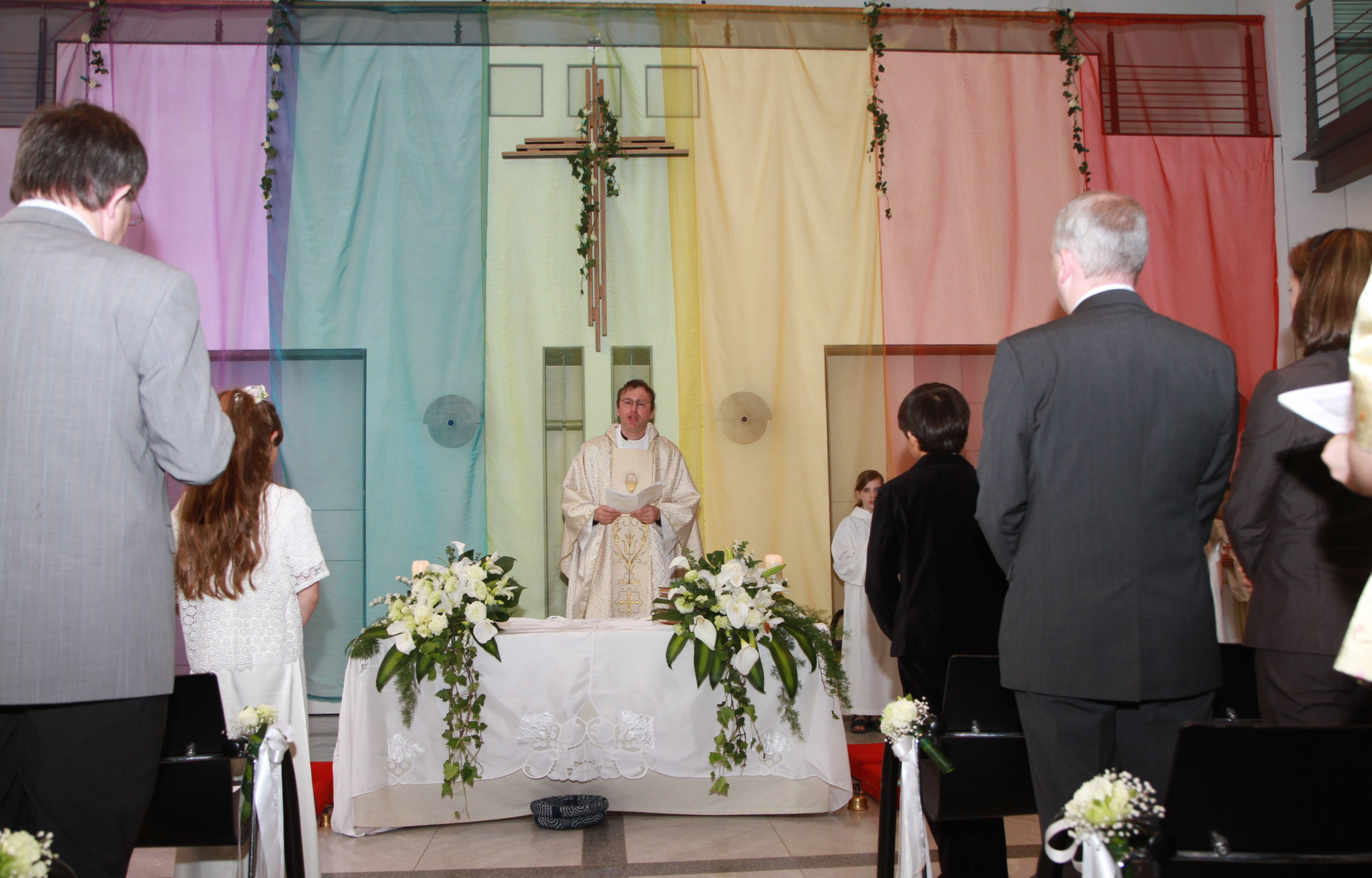 Pfarrer Michael Bauer bei der Feier der Heiligen Erstkommunion in der deutschen Botschaft in Peking